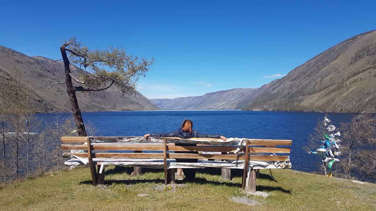 Озеро Кара-Холь: Озеро Кара-Холь расположено в северной части на землях муниципального образования "Бай-Тайгинский кожуун" Республики Тыва., Бай-Тайгинский кожуун, Тува This image is related to the protected area of Russia number 1710003